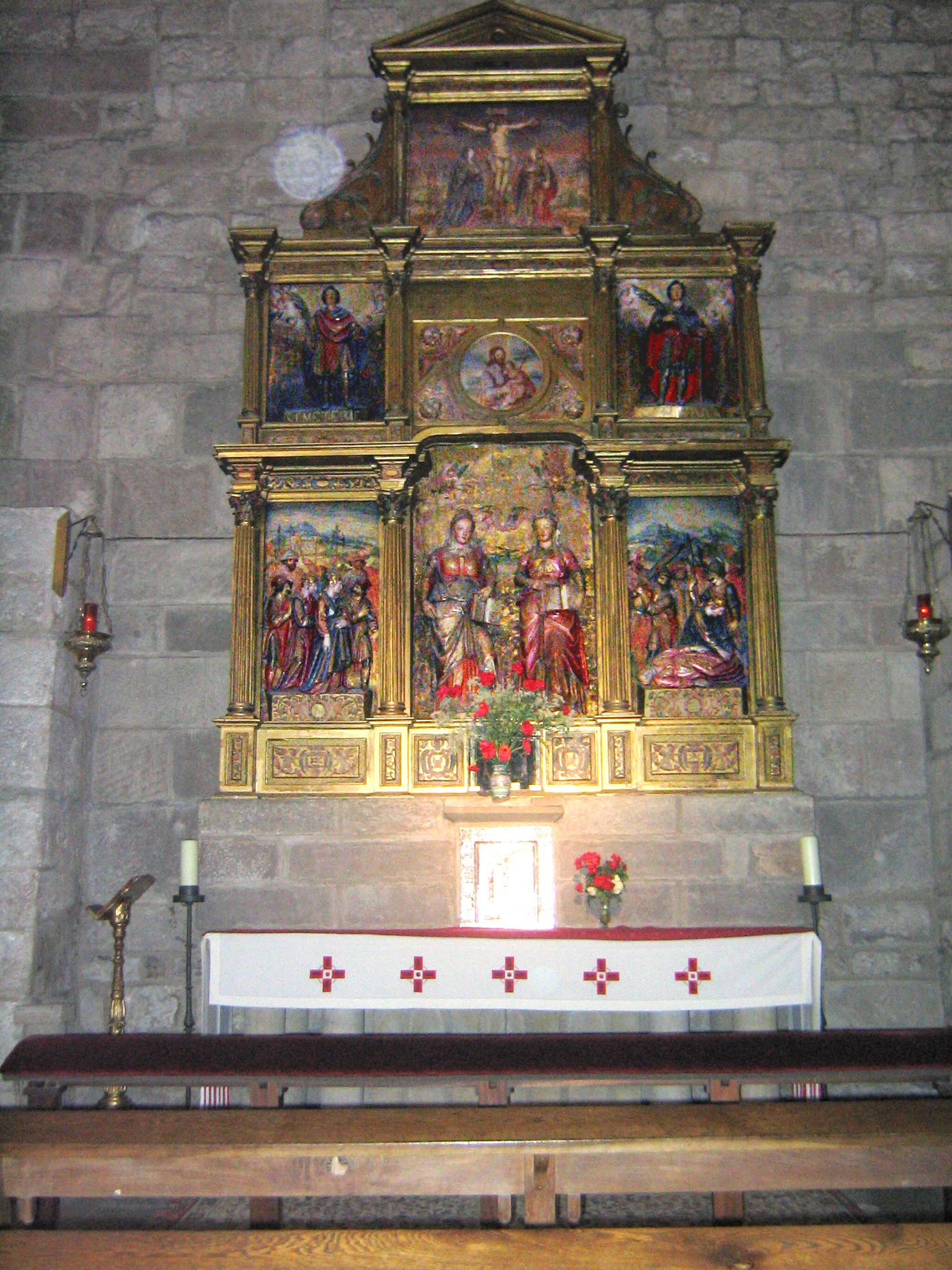 Monasterio de Leyre, retablo de las santas Nunilo y Alodia, Yesa, Navarra (España).